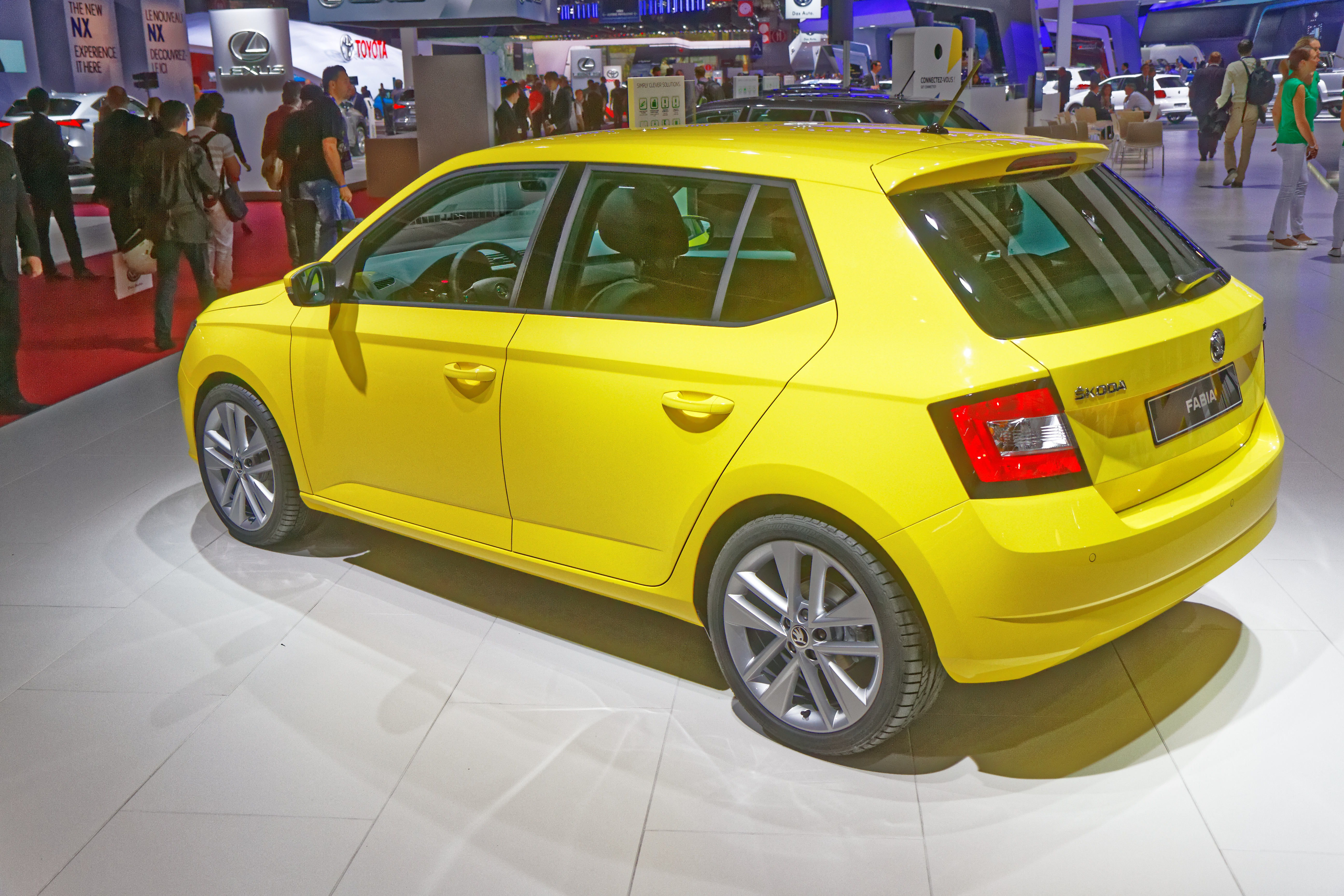 Une Škoda Fabia présentée lors du mondial de l'automobile de Paris 2014.